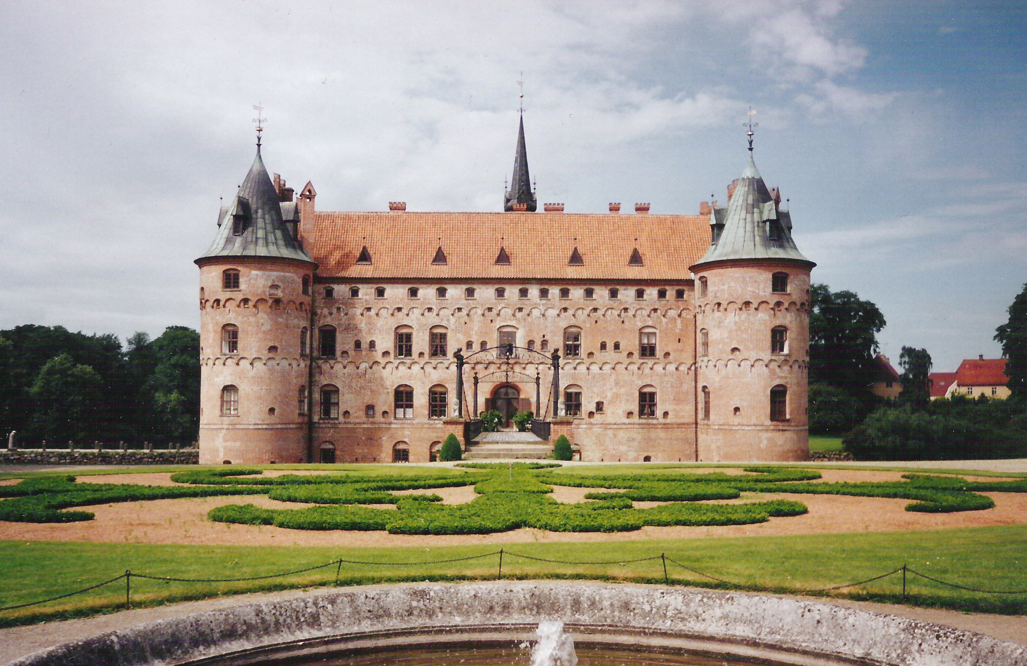 Egeskov på Fyn